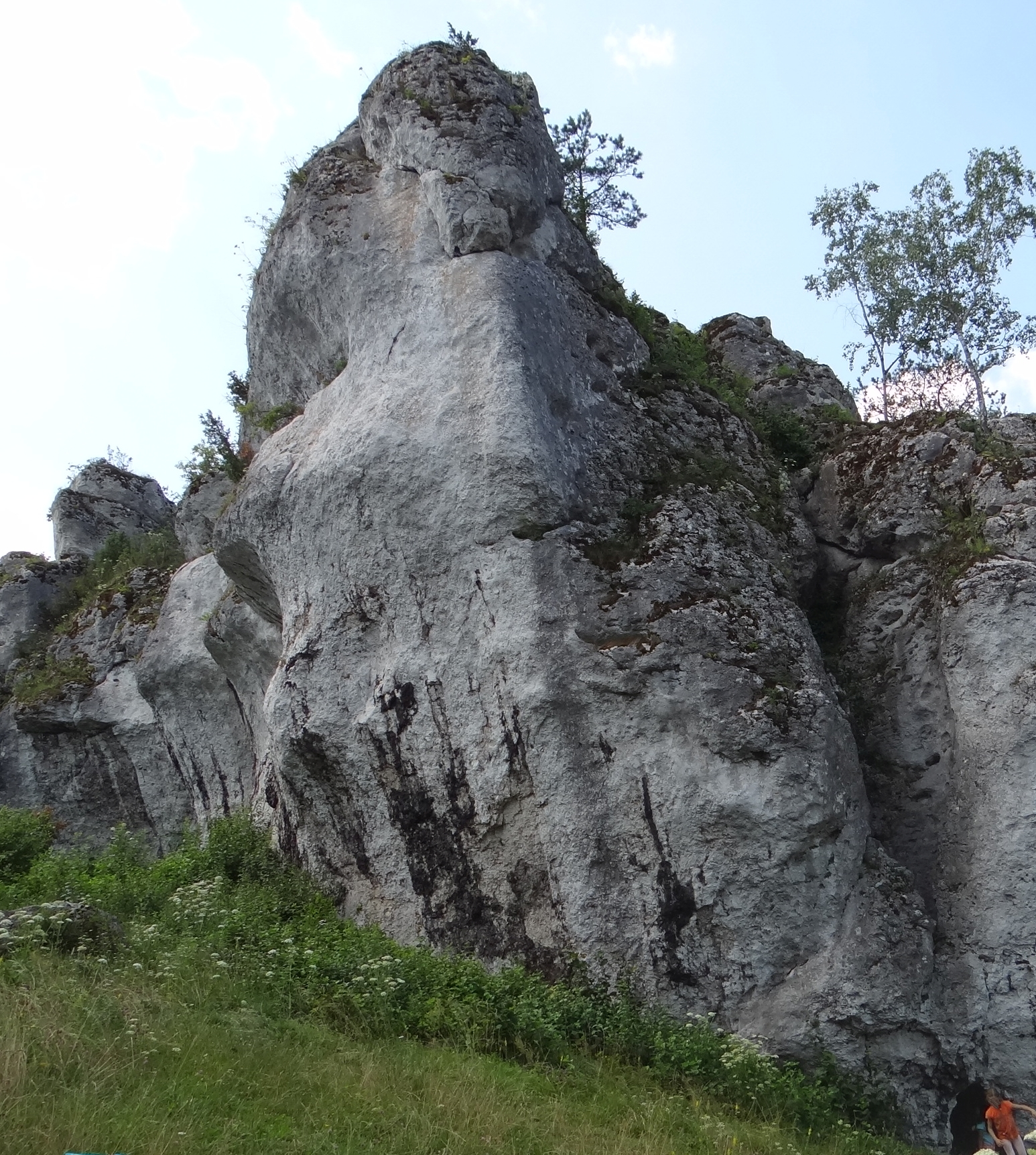 Turnia Szafa w Grupie Truni Kukuczki (skały Mirowskie). Widok od wschodu